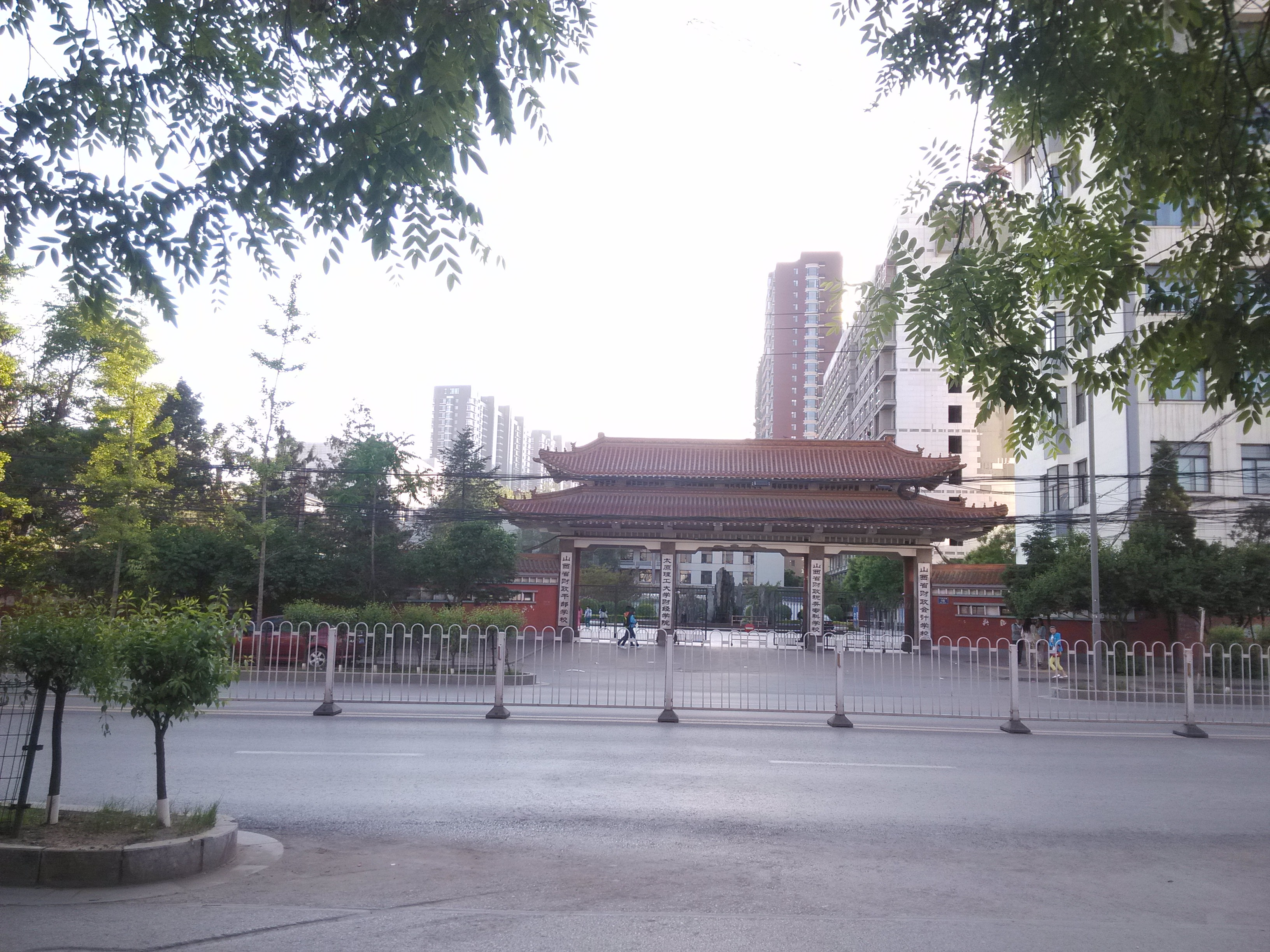 中文（中国大陆）: 山西省财政税务专科学校校门。